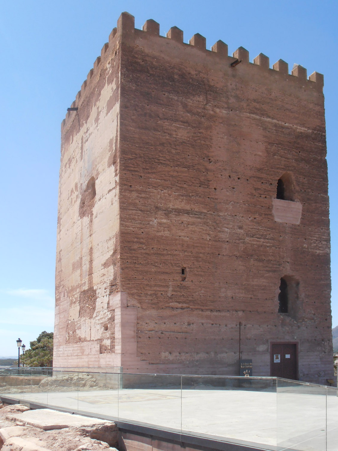 Aledo: Torre de Homenaje from East